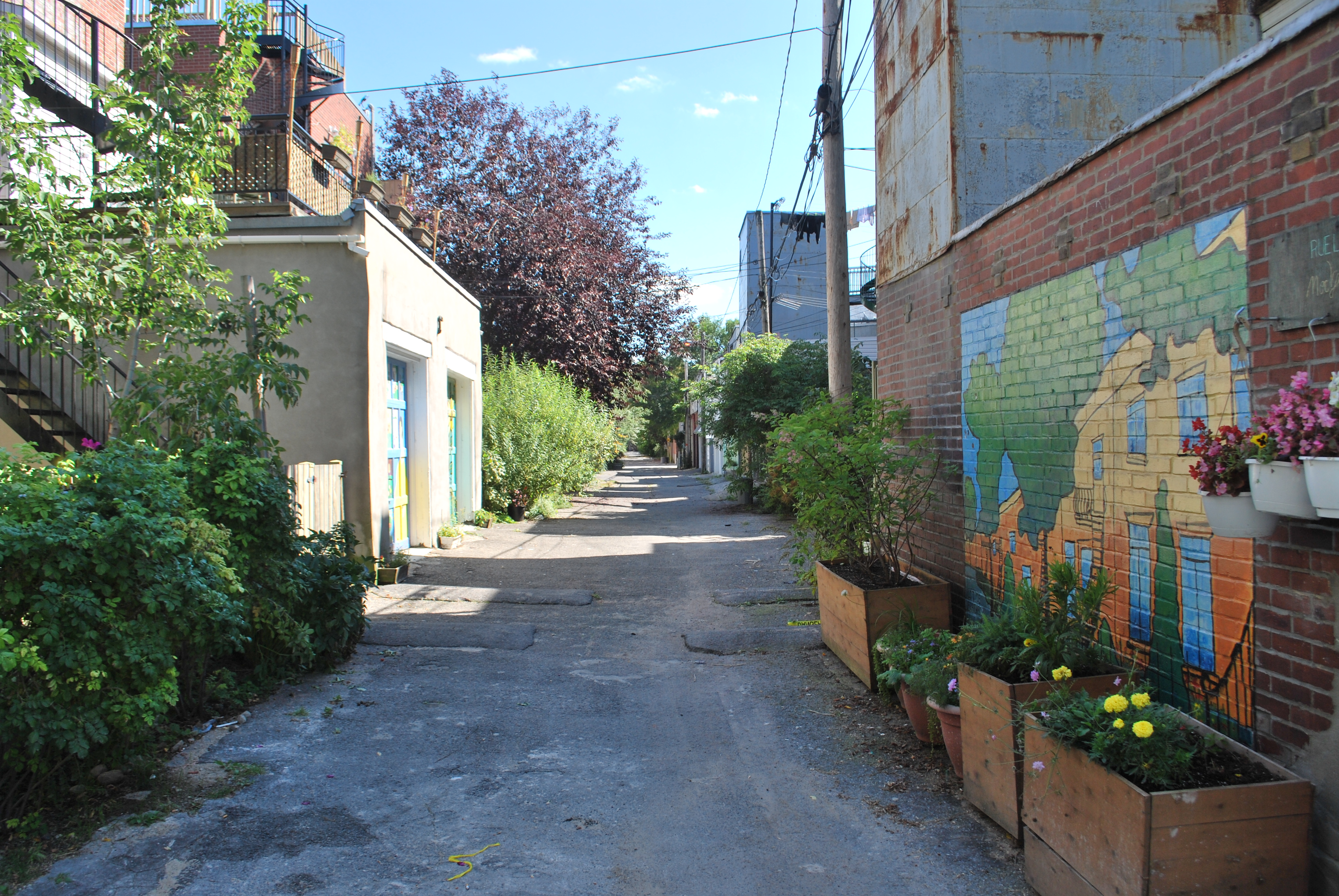 Ruelle verte à proximité du coin Brébeuf-St-Joseph dans le Plateau Mont-Royal.